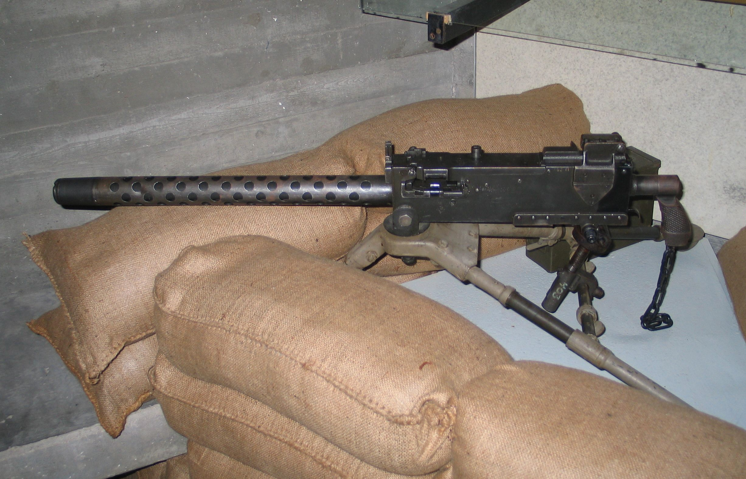 Browning M1919 machine gun in Kibbutz Yad Mordechai museum.